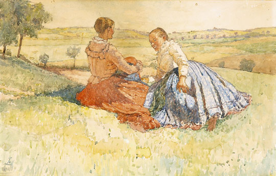 Lányok a réten. Akvarell, papír. 32*48 cm